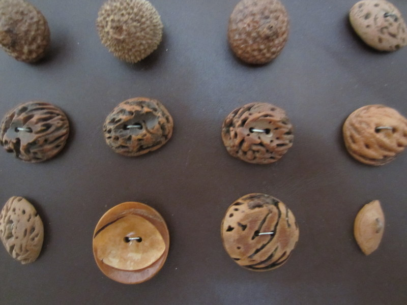 Knoflíky vyráběné z pecek ovoce